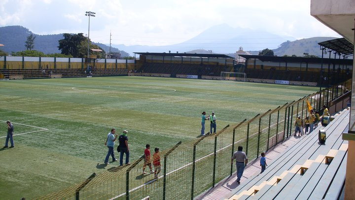 el Julio A. Cobar desde dentro